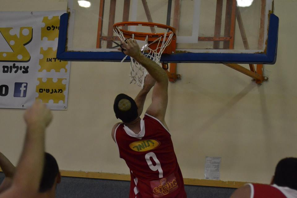 שחקן הקבוצה ג'ונתן בייז גוזר את הרשת לאחר זכיית הקבוצה בסדרת הגמר של הליגה הארצית והעלייה לליגה הלאומית